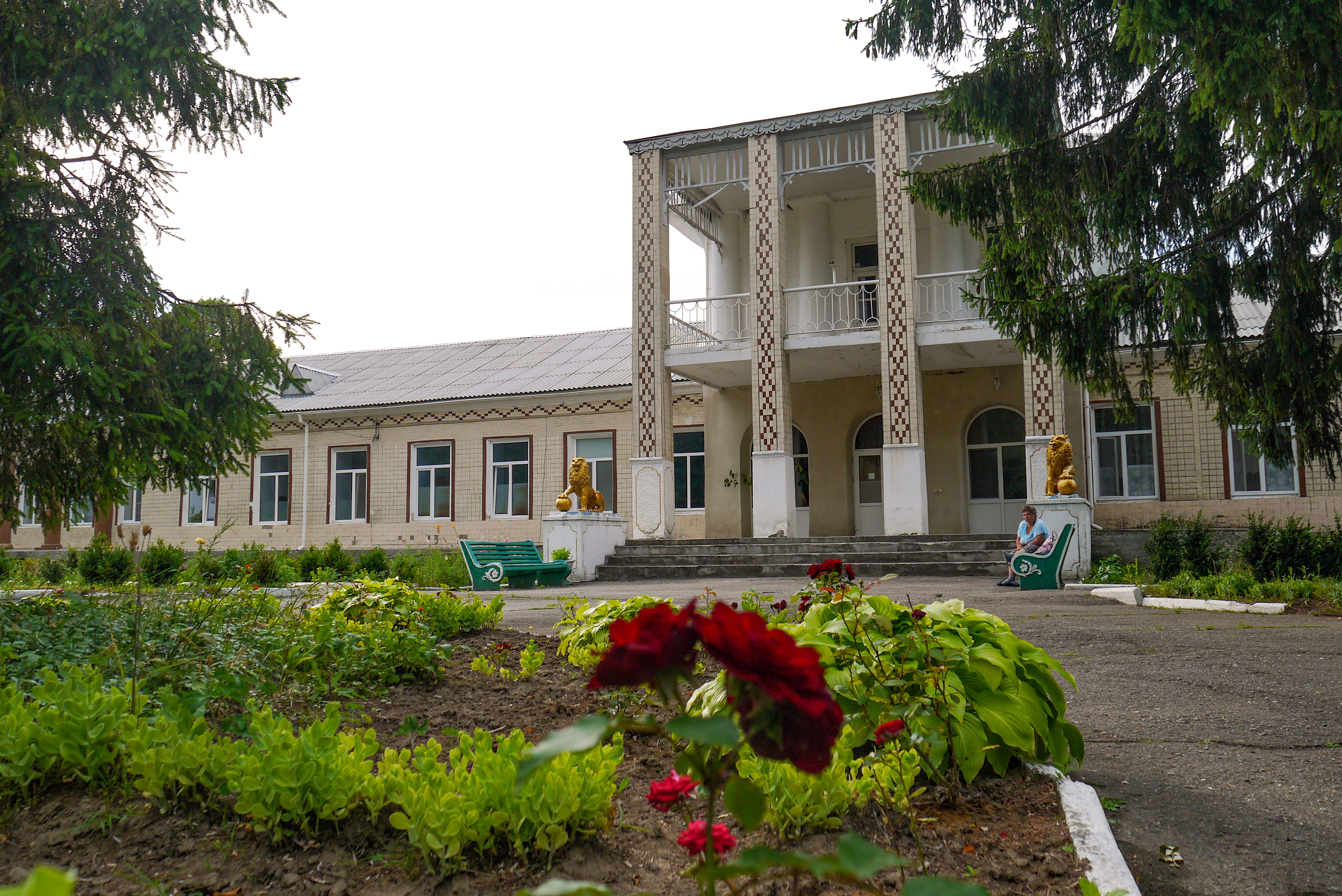 Палацо-парковий ансамбль садиби Орловських — Палац, Северинівка